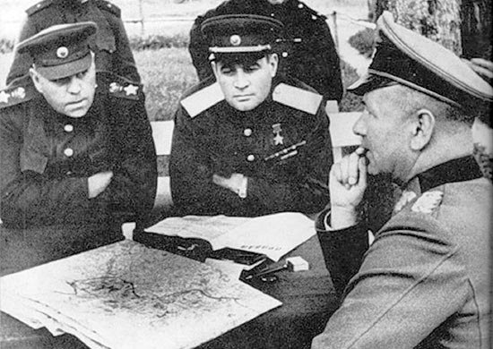 Маршал Советского Союза А. М. Василевский и генерал армии И Д. Черняховский допрашивают пленного немецкого генерала. 1944 г.